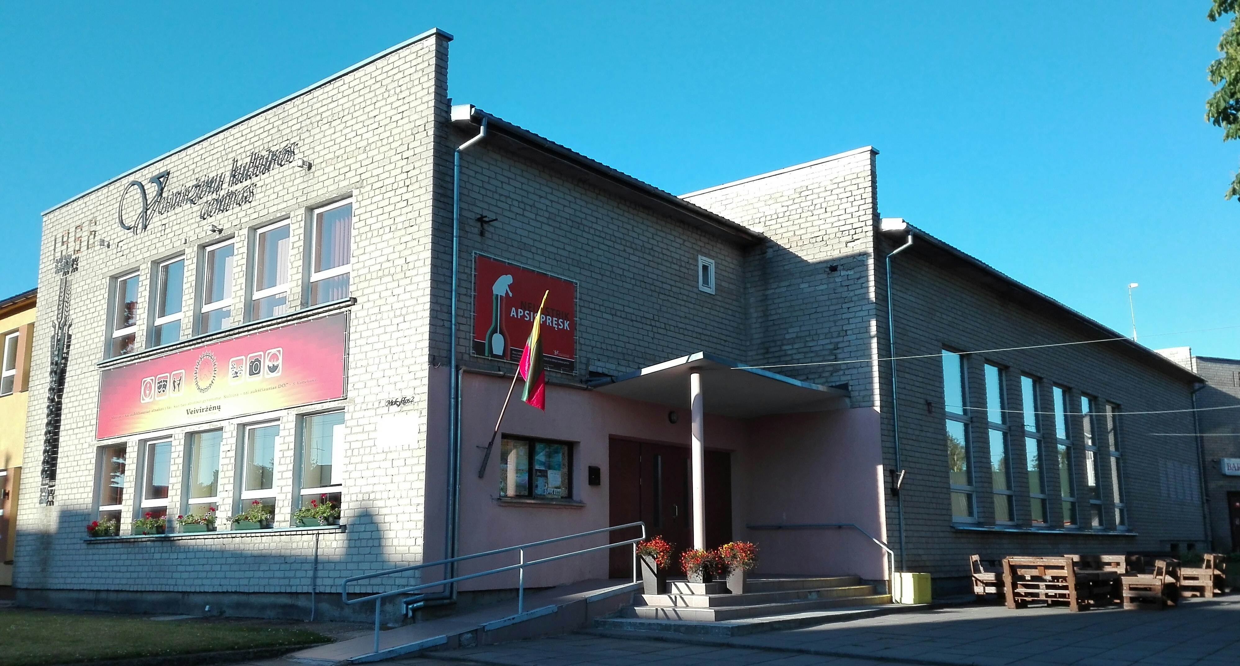 Veiviržėnų kultūros namai